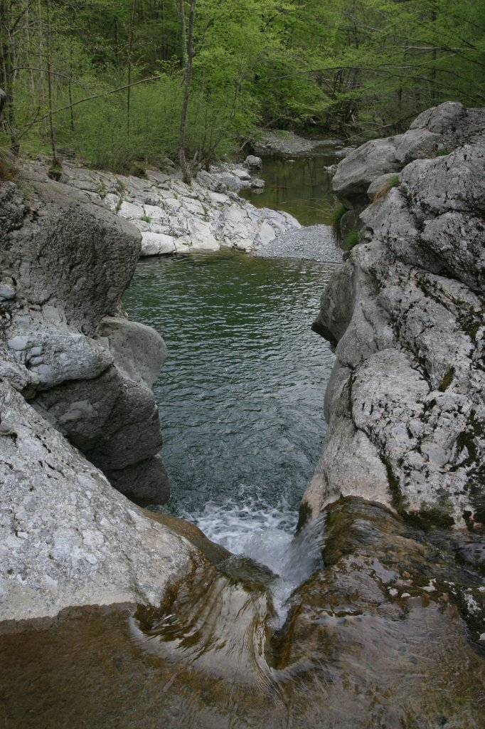 Idrija (Iurdio) river in Slovenia/Italy